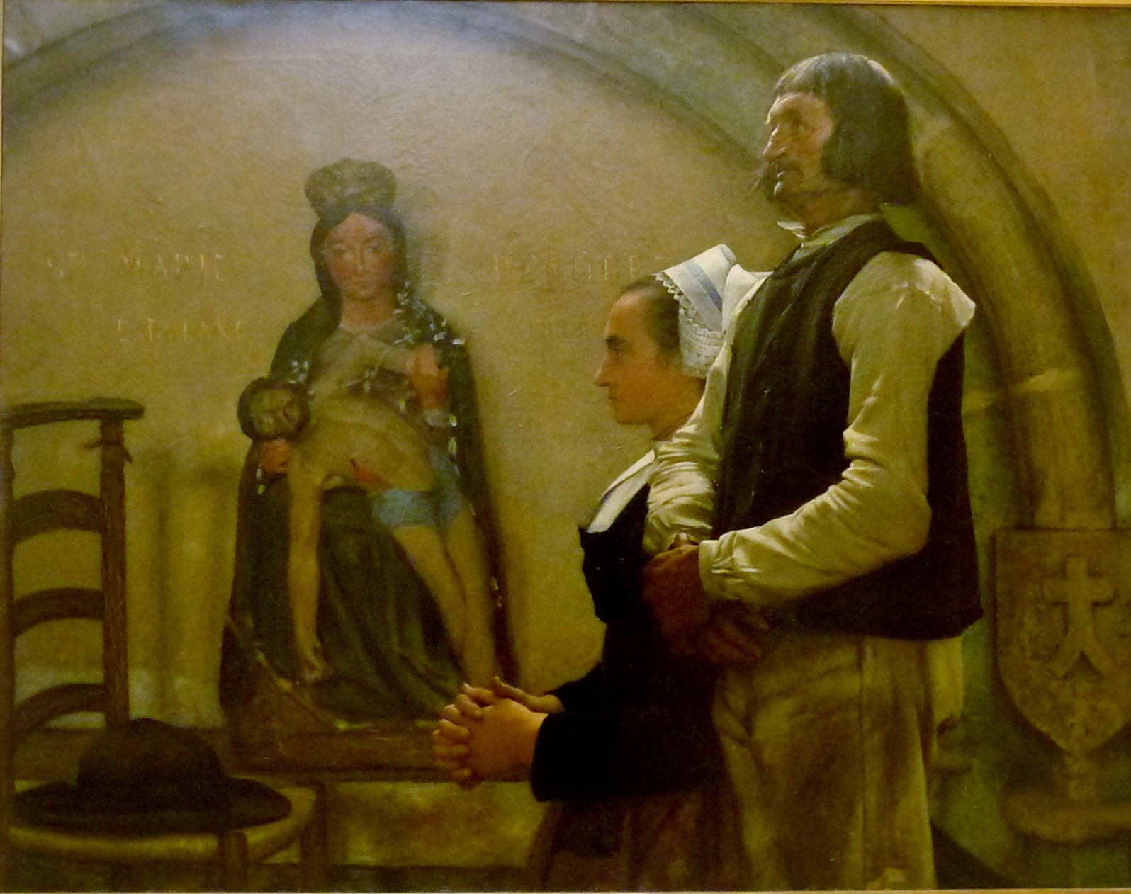 Jean-Eugène Buland : Visite à le Vierge de Bénodet (1898)